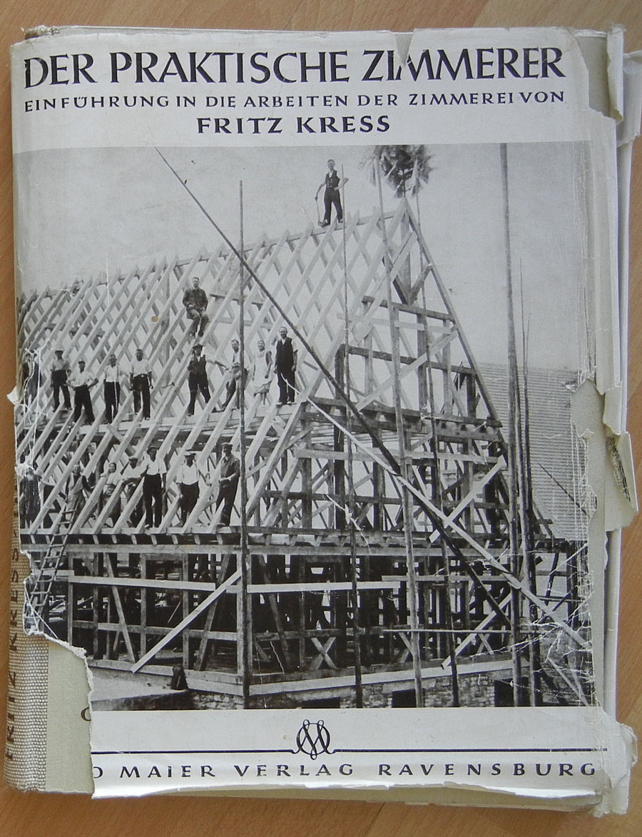 Das Buch von Fritz Kreß Der praktische Zimmerer. Einführung in die Arbeiten der Zimmerei von Fritz Kress, Ravensburg : Otto Maier Verlag, Ausgabe von 1940.